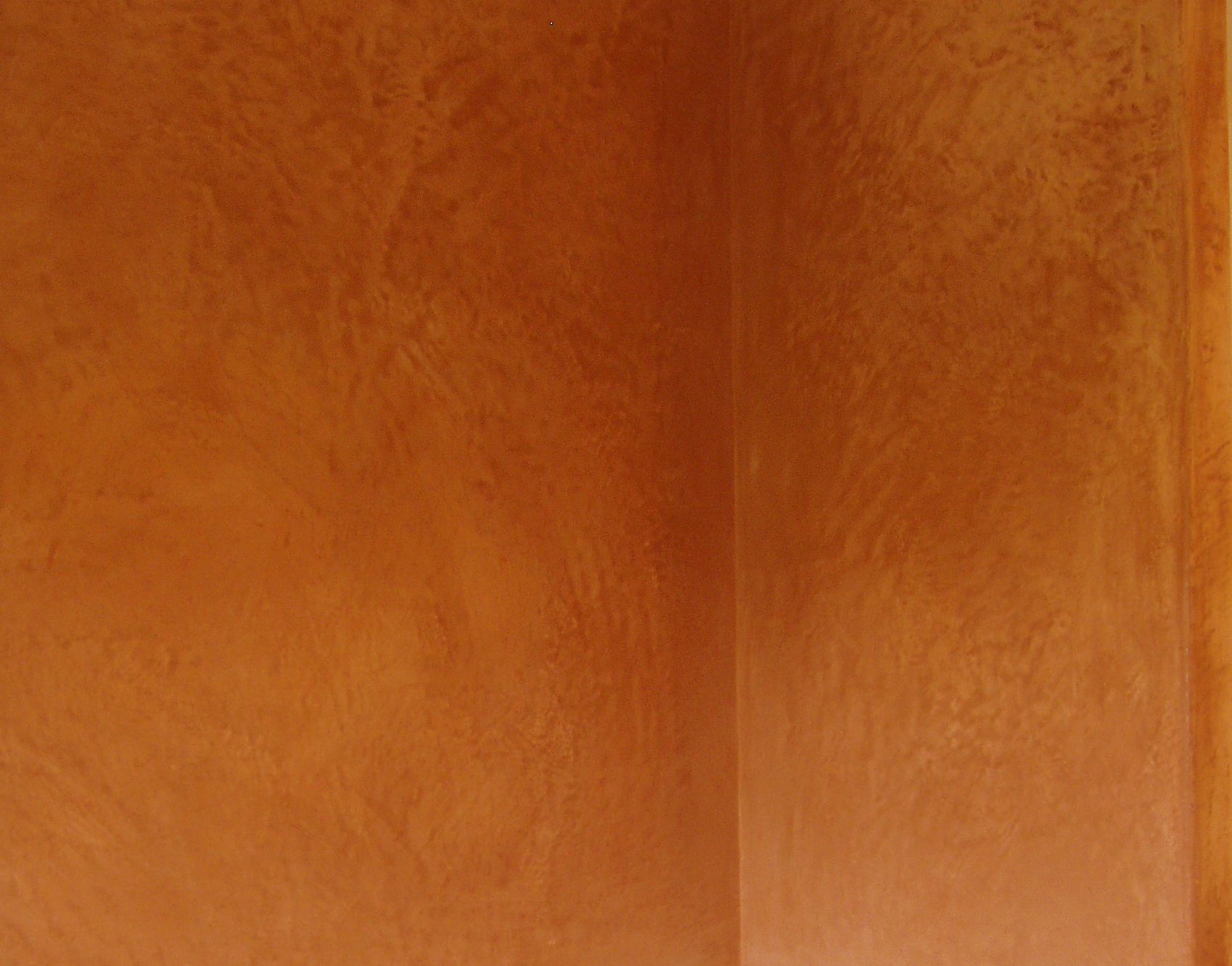 Echantillon de tadelakt-Stéphane Baron.